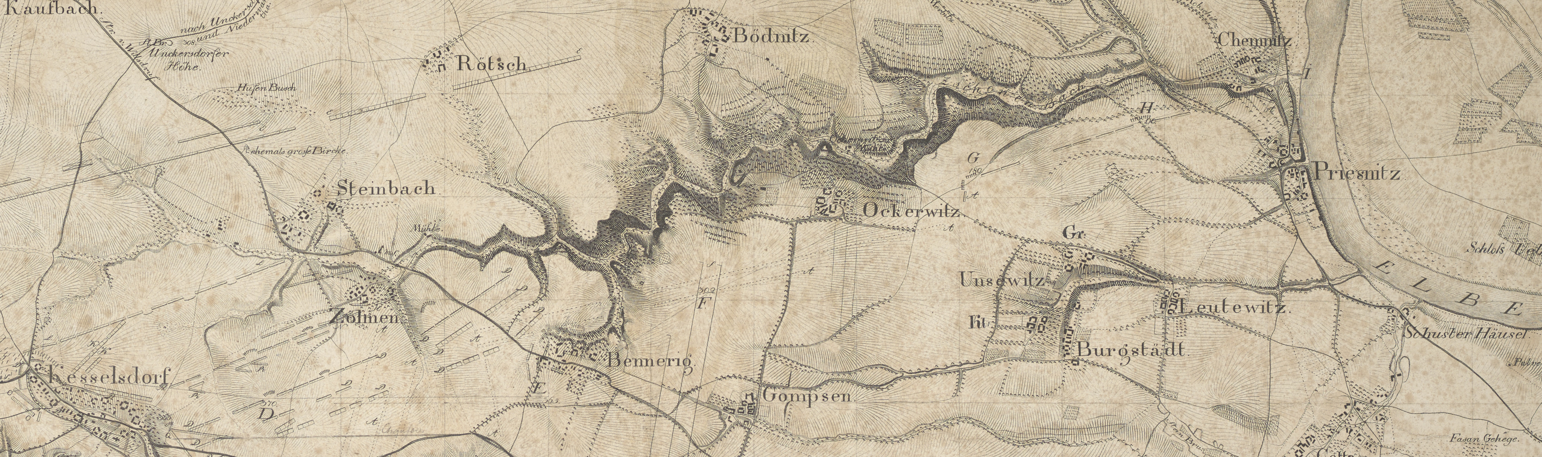 1 Kt. : unkolor. (58 x 39 cm) ; Maßstab 1:20.515 ; Koordinaten E 13°32'42"-E 13°44'08"/N 51°04'31"-N 51°00'22" ; Maßstab in graph. Form (Leipziger Ell.). - Titel oberhalb des Kt.-Feldes. - Maßstab unterhalb des Kt.-Feldes. - Ohne Kt.-Netz. - Erl. zur Schlacht links unten. - Mit Truppenstellungen. - Mit 1 Profil (Höhenqueerschnitt). - Relief: Schraffen